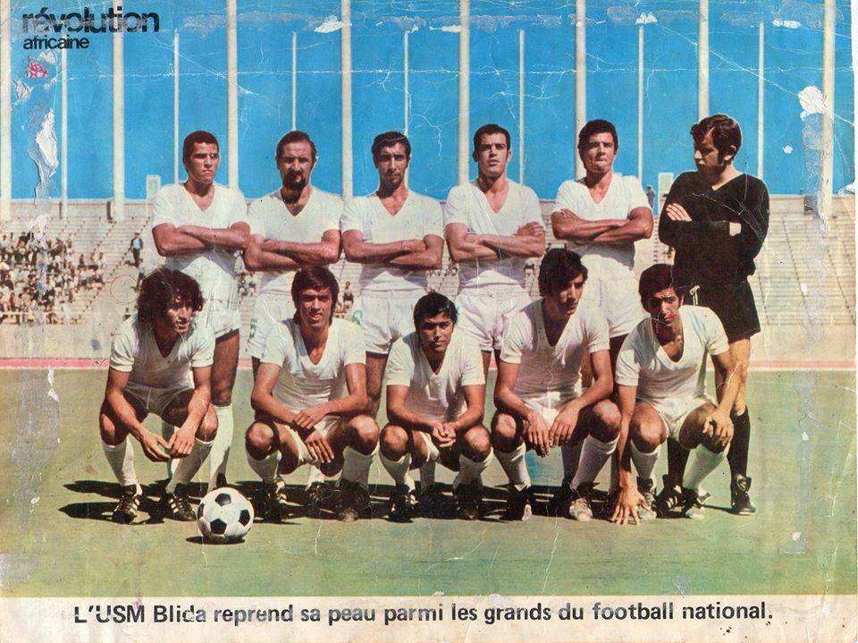 1er match disputé au stade du 5 juillet en championnat entre l'USM Blida et CR Belcourt (1-0). De gauche à droite : Debout : Amar Amrane - Berrouane - Hmed Benzohra - Rabah Saâdane - Mohamed Amour - Farid Allili (GB). Accroupis :Idries - El Hadi Benturki - Nadhir Kellal - Nasreddine Akli - Mustapha Sellami